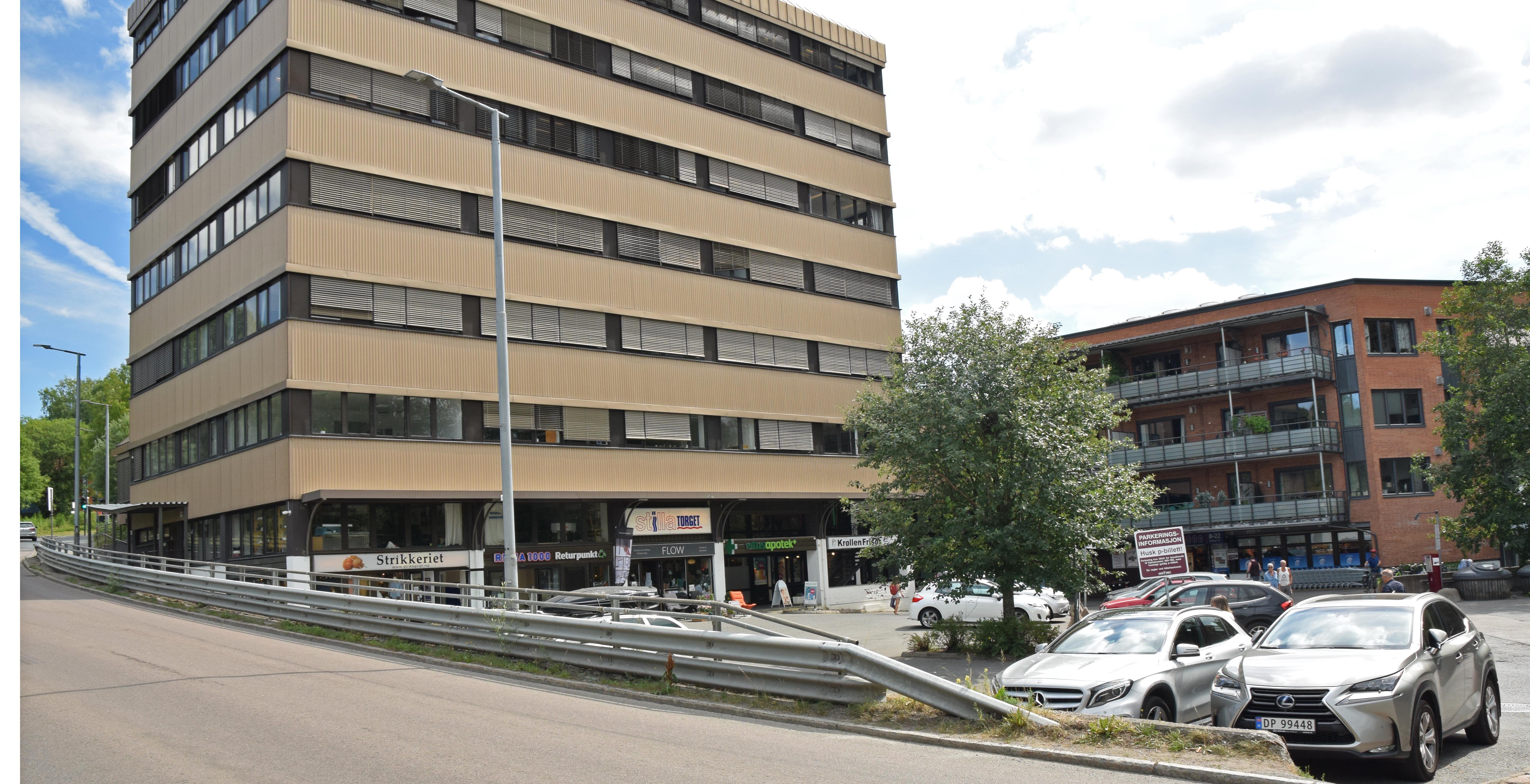 Stillatorget, Kjelsåsveien 160